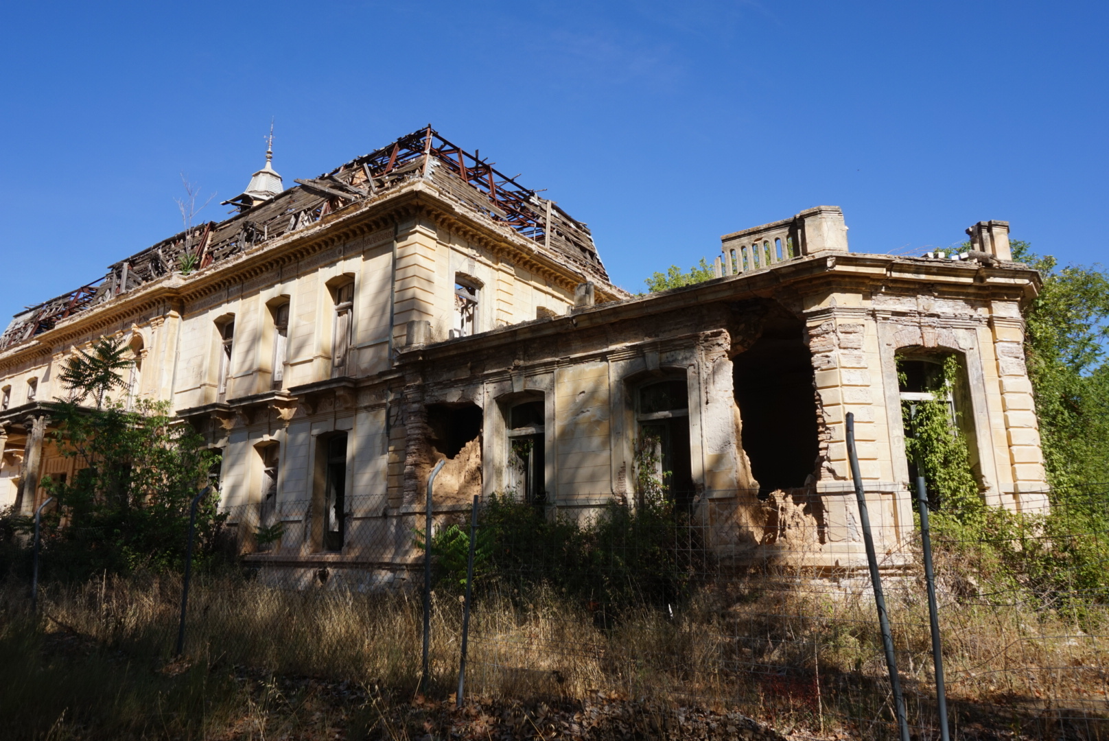 Palacio de los Gosálvez